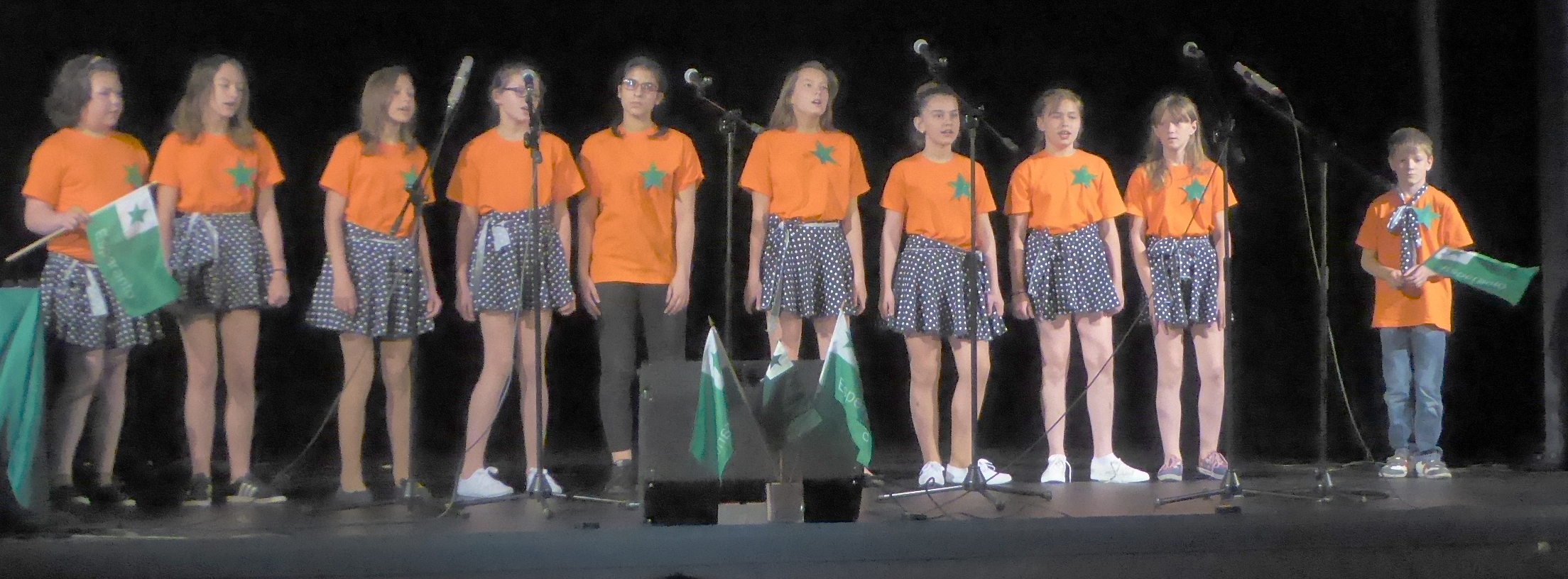 Vroclavo, premiado de infana koruso dum la 5-a Eŭropa Festivalo de Esperantaj Kantoj, kadre de la Internacia Majrendevuo 2017.